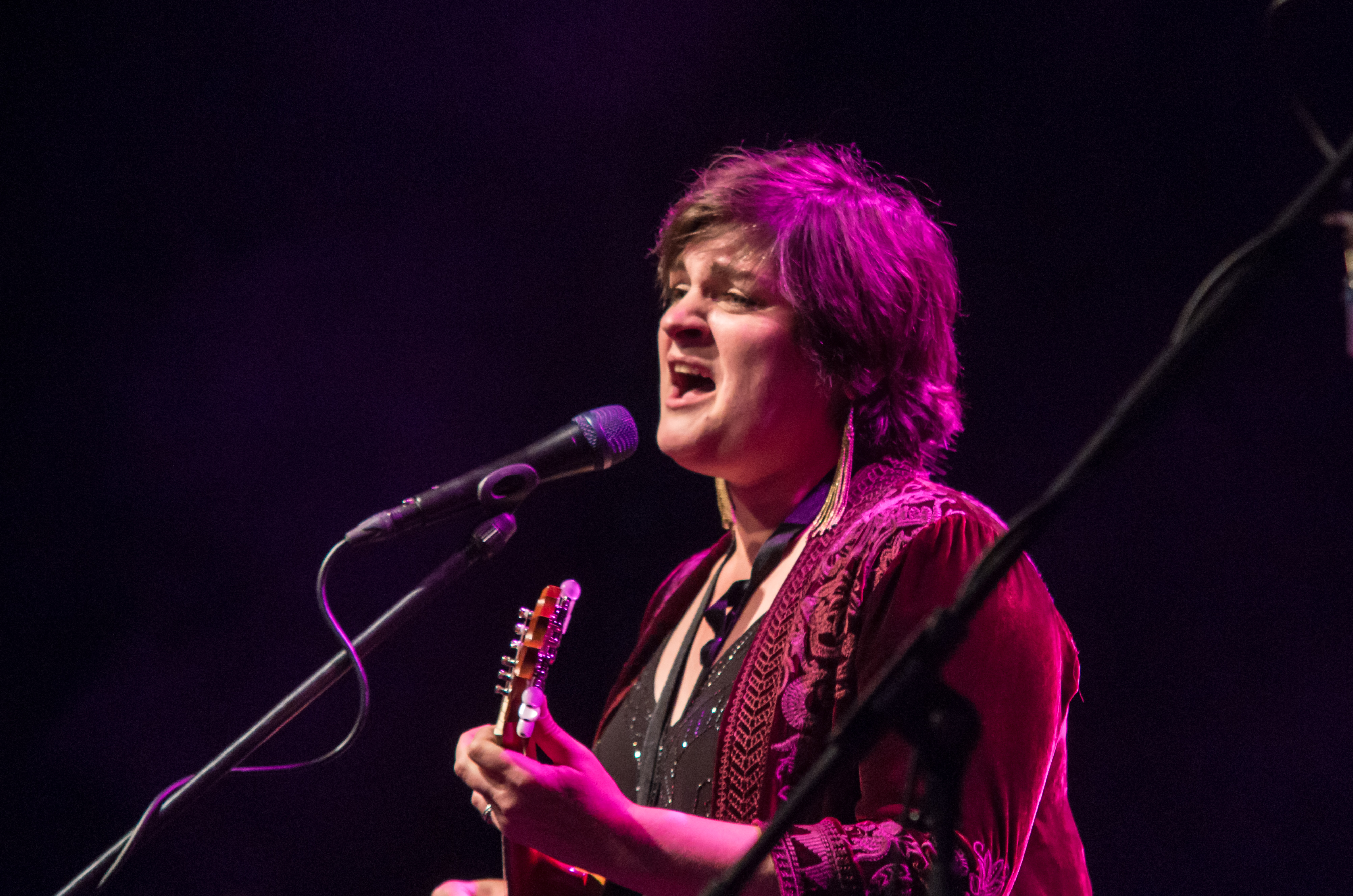 Das Zelt-Musik-Festival 2019 in Freiburg im Breisgau 15.07.2019 Madeleine Peyroux